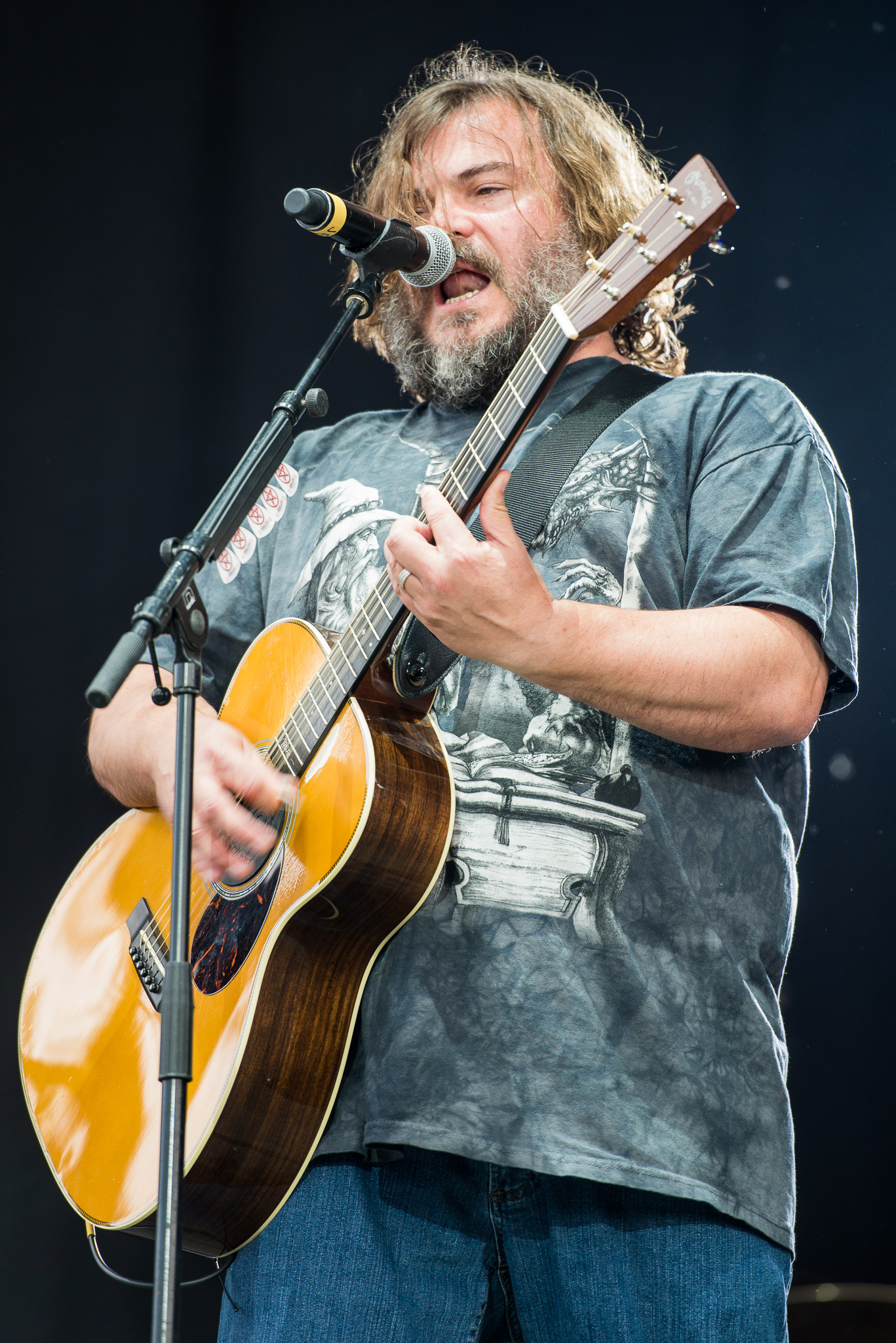 ARGO-Konzerte,Festival,Jack Black,Konzert,Livekonzert,Livemusik,Musik,RiP,Rock im Park 2016,Seat Zeppelin Stage,Tenacious D